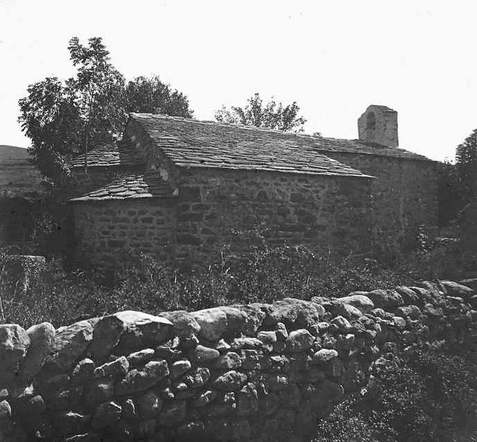 Vista de Tartera. Josep Salvany i Blanch (1924)